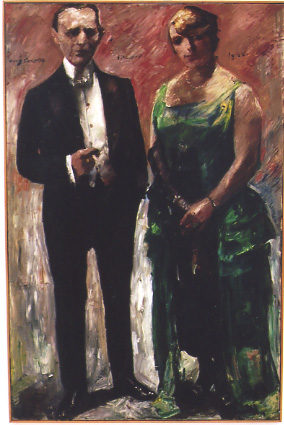 Porträt des Kunstsammlerehepaares David (1888-1947) und Lola Leder (1892-1977) von Lovis Corinth (ca. 1915)